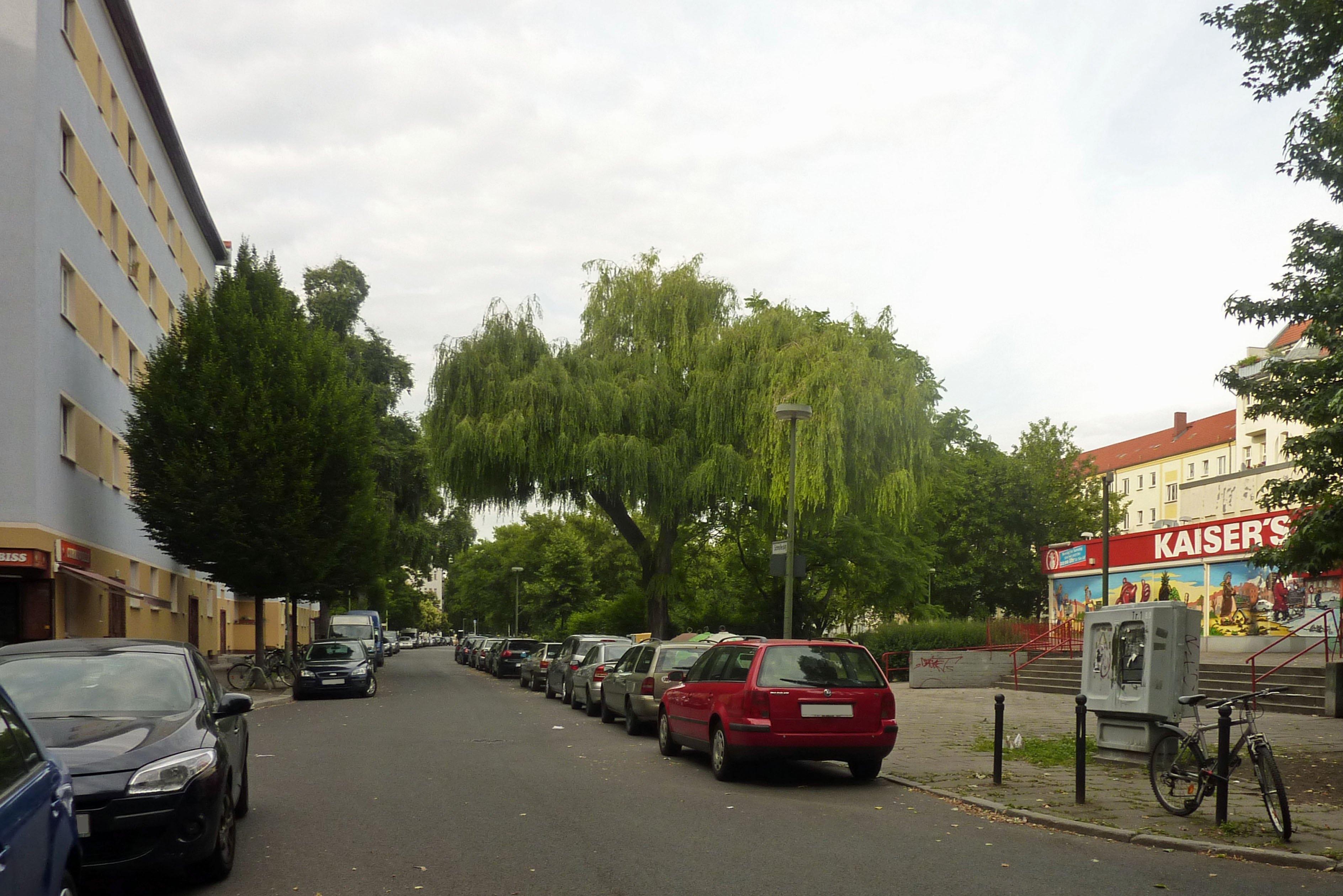 Schmollerplatz in Berlin-Alt-Treptow. Blickrichtung Nordosten.